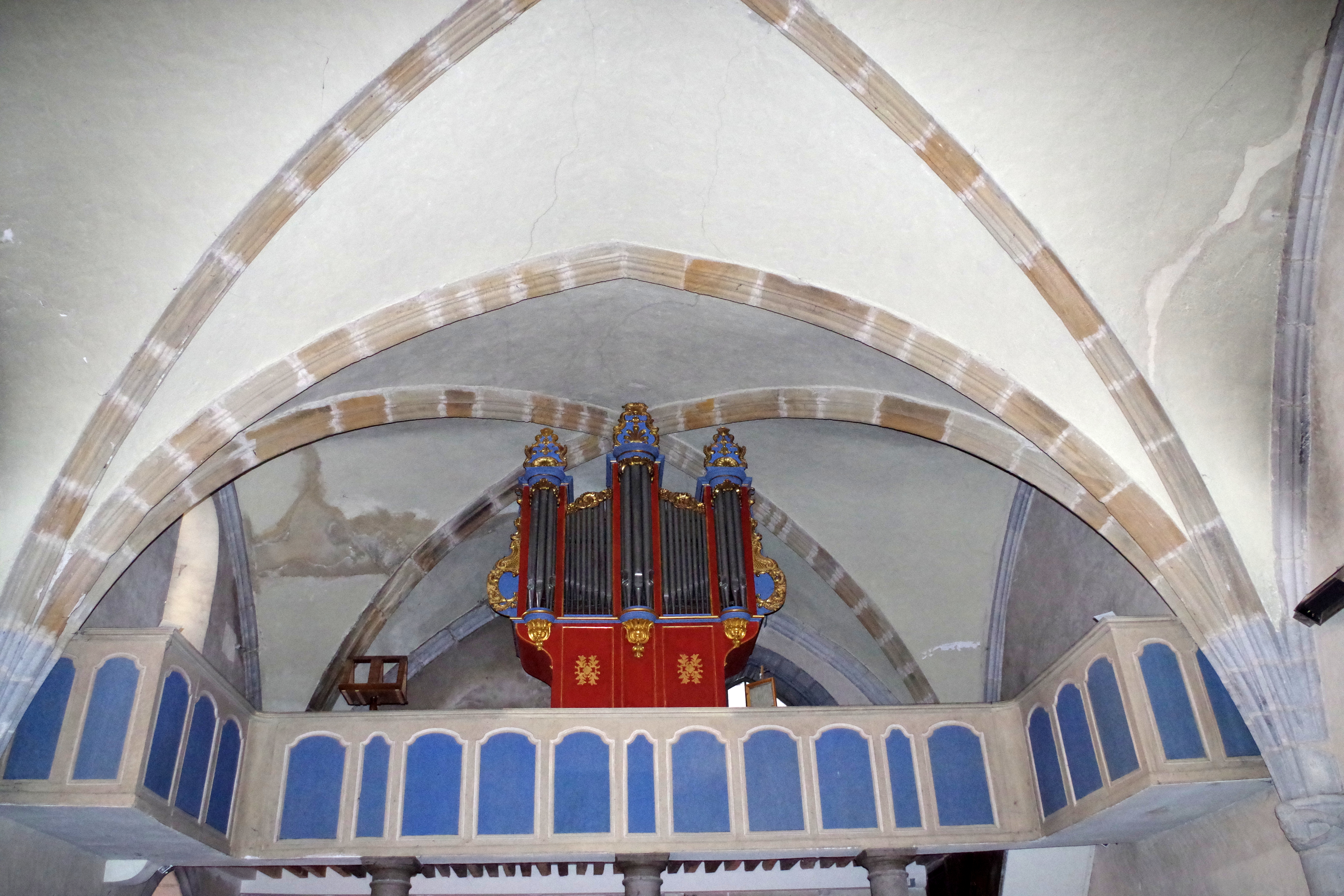 Orgue de tribune (2ème moitié XVIIIe) restauré en 1984, buffet à 3 tourelles (châtaignier : taillé, peint, doré)